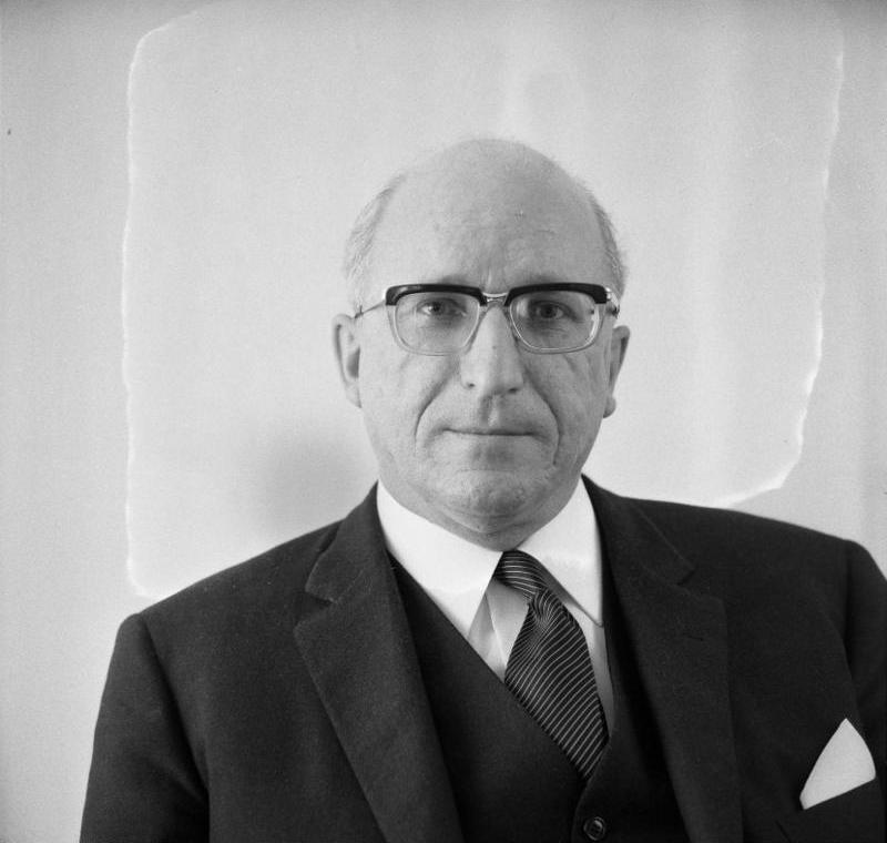 Portrait Ministerpräsident Kühn